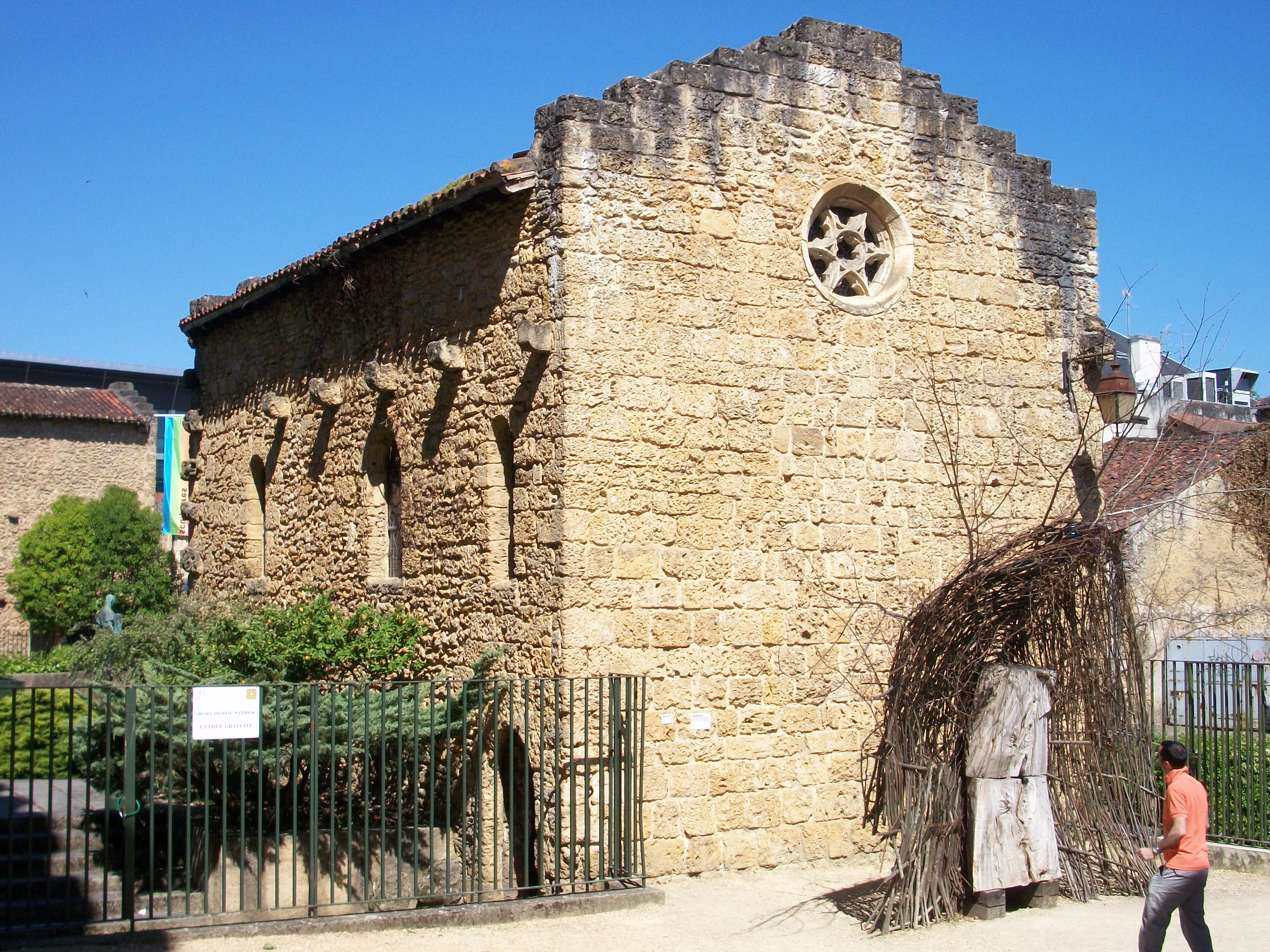 Ancienne chapelle romane (Mont-de-Marsan, France).